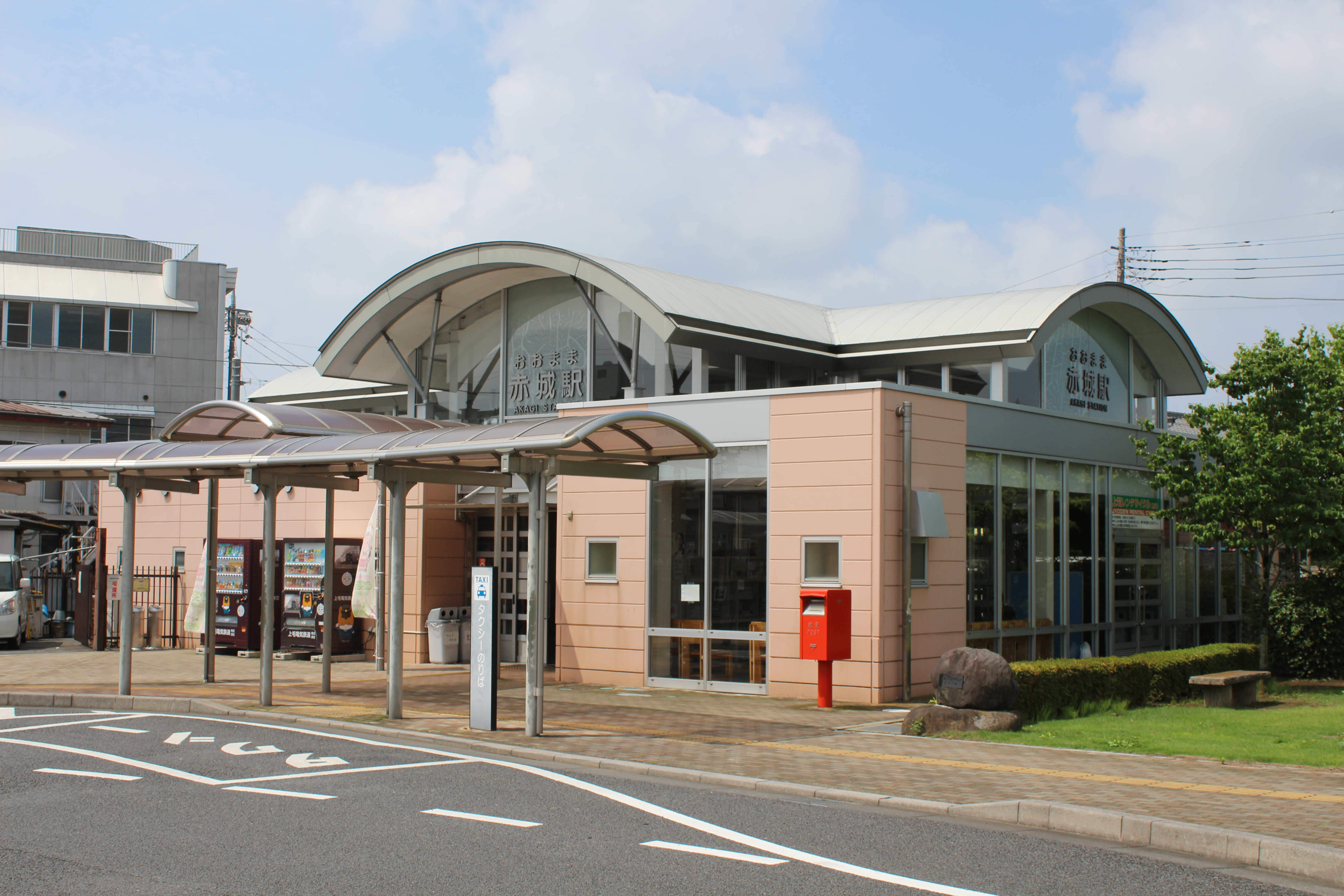 赤城駅 Canon EOS Kiss X7i